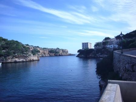 Vista de la entrada al puerto de cala figuera